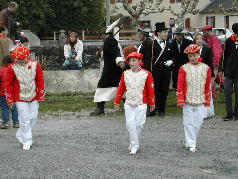 Sohütako gazteek 2003an prestatu zituzten maskaradak. Lehen agerrialdia Sohütan bertan egin zuten 2003ko urtarrilaren 12an. Argazkian kükülleroak.